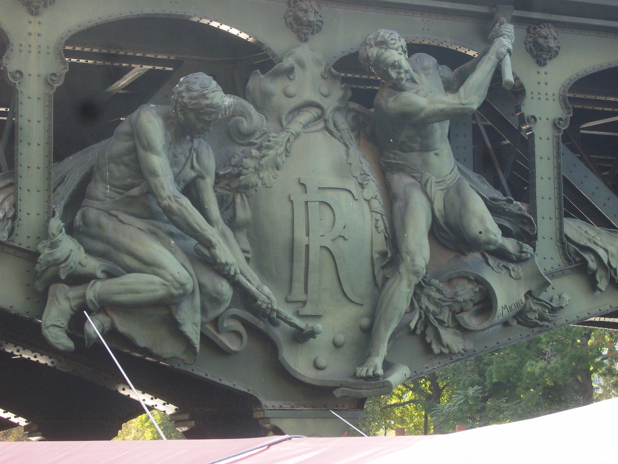 Paris 15e arrondissement - pont de Bir-Hakeim - les forgerons-riveurs, sculpture de Gustave Michel